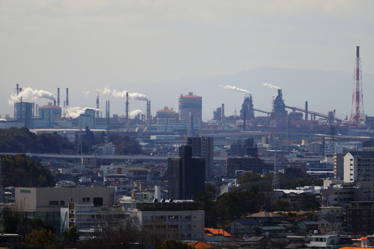 滝の水公園からの眺望（日本製鉄名古屋製鉄所）（名古屋市緑区篠の風、2019年（平成31年）3月）